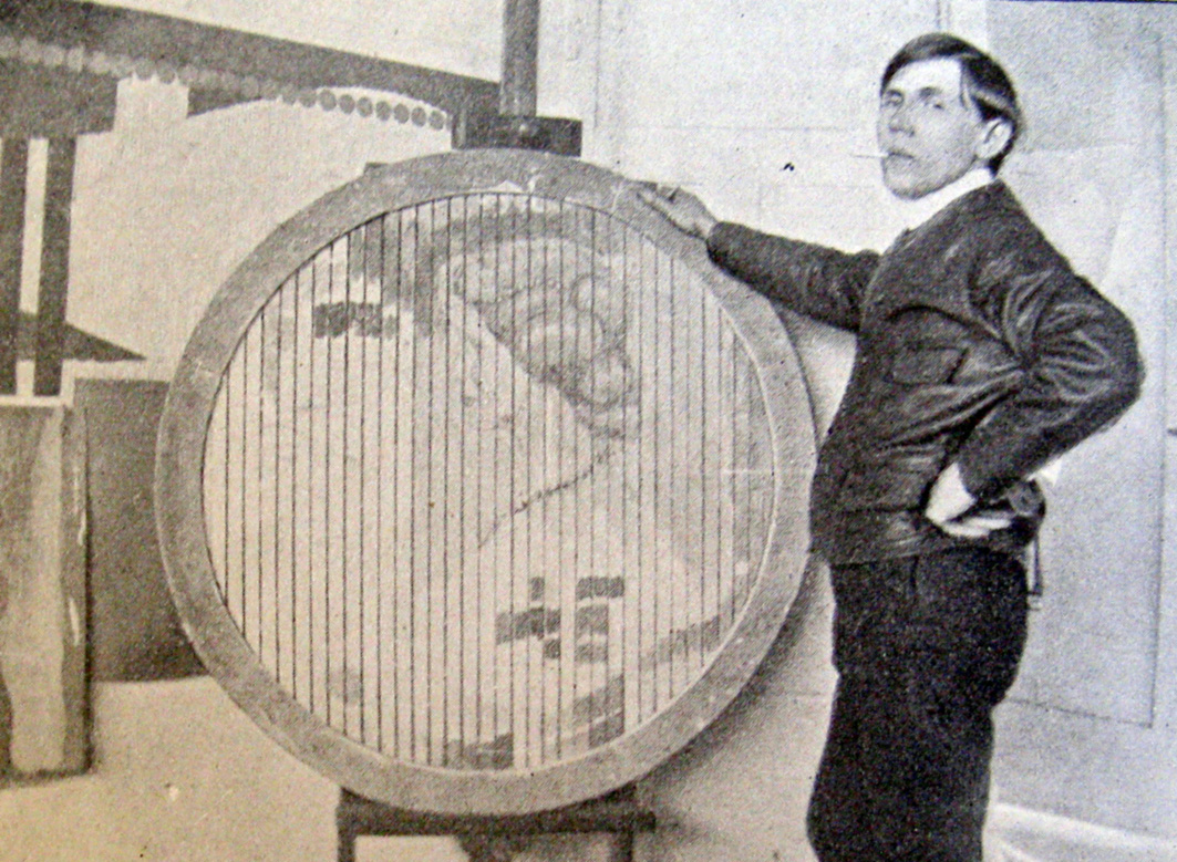 Valdemar Andersen 1909